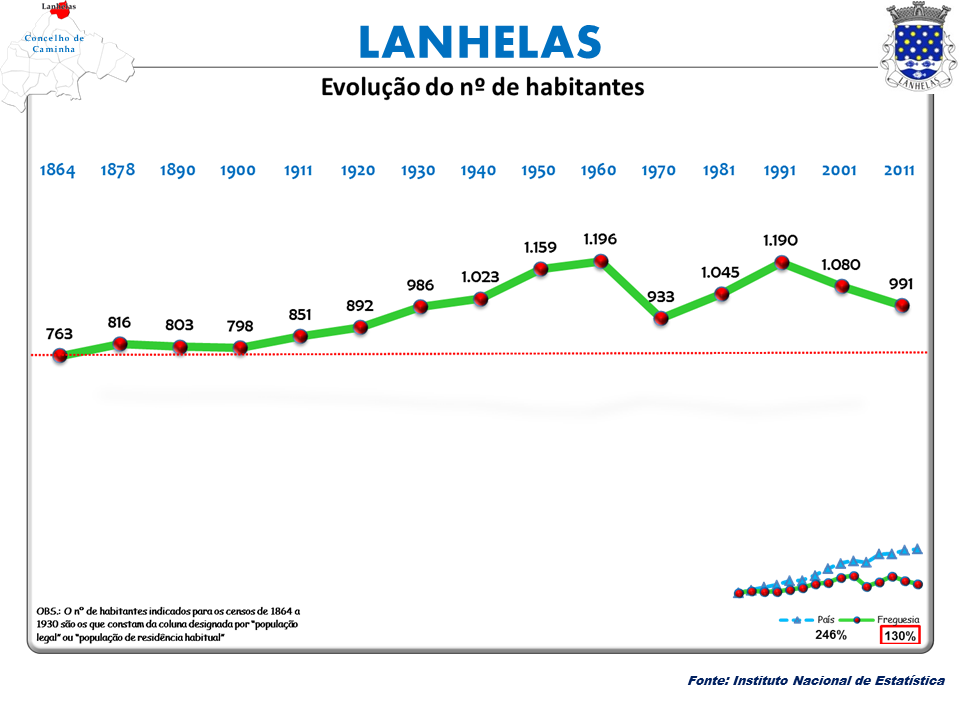 Censos 1864/2011